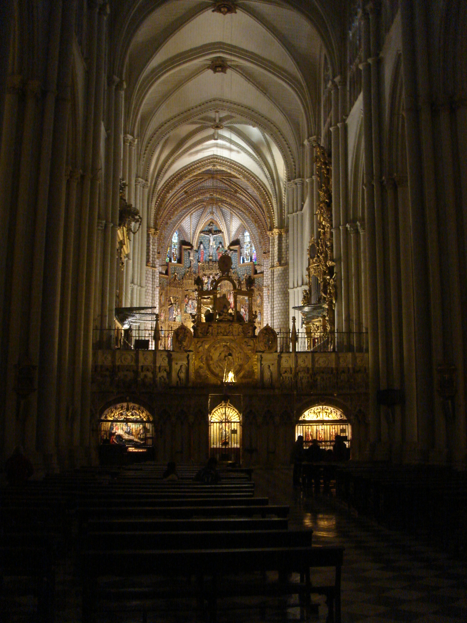 Capilla interior de la catedral de Santa María de Toledo.